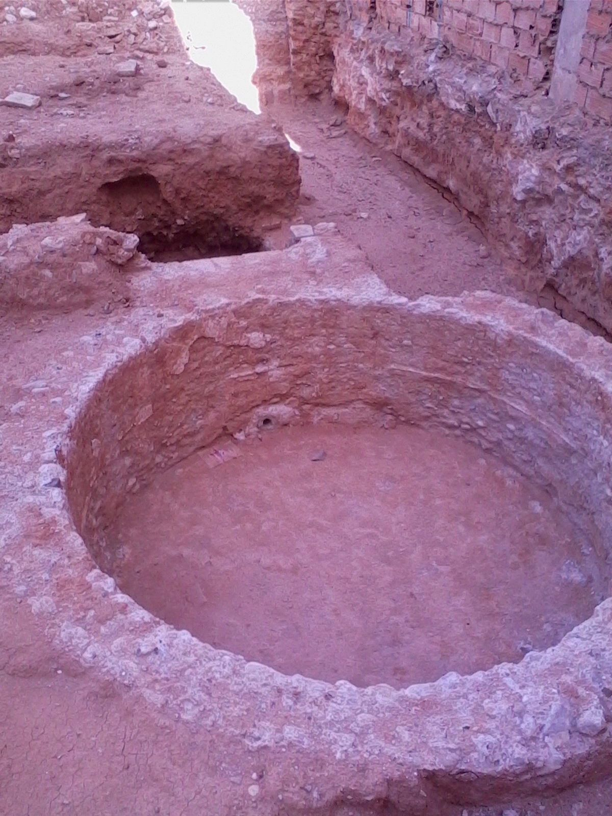 Restos arqueológicos de un taller de vino taller de vino del siglo XVII en Benetússer. [1][2]